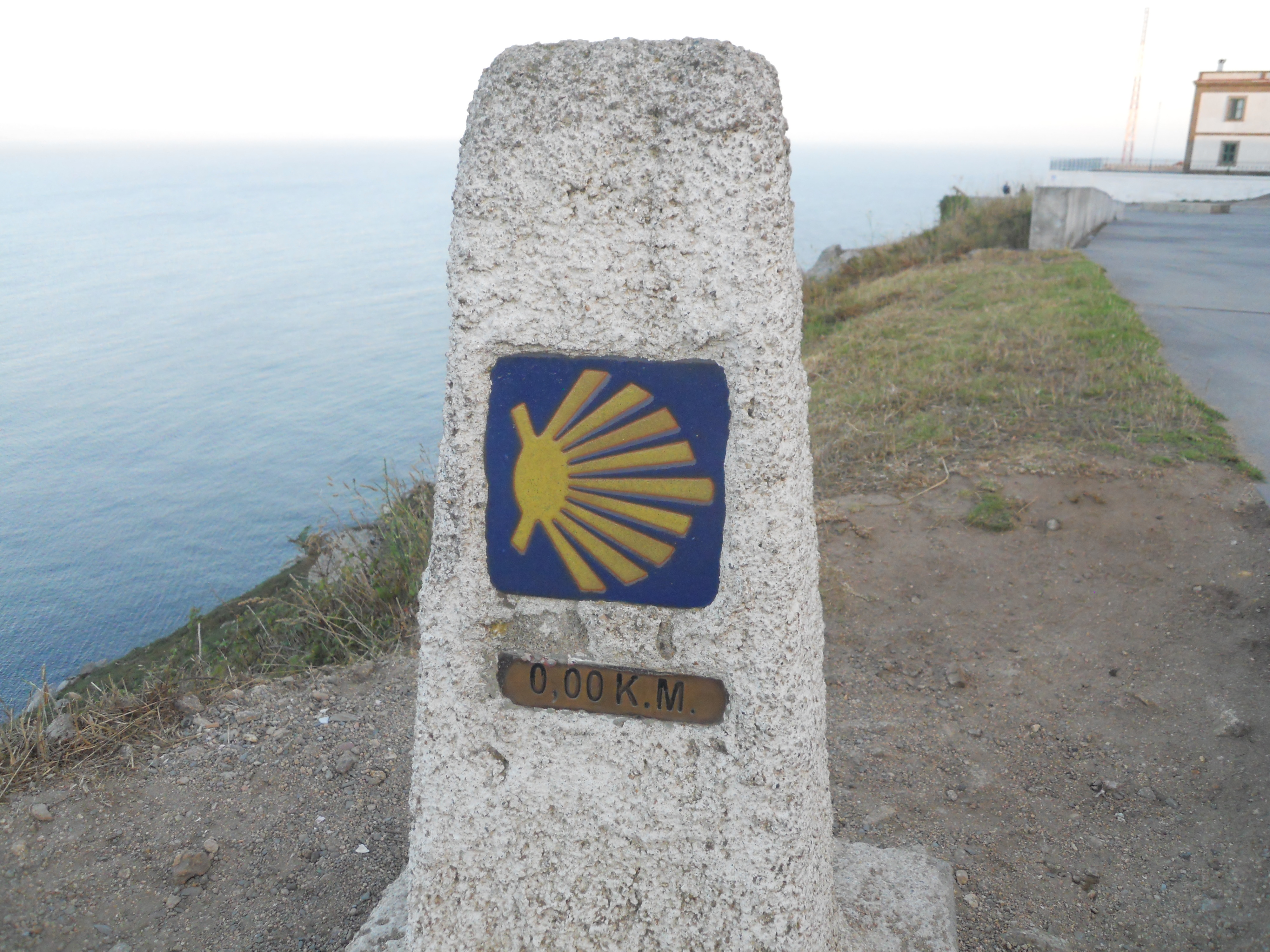 Il Cippo Kilometro zero